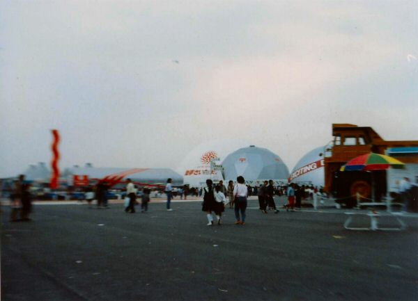 '88さいたま博覧会